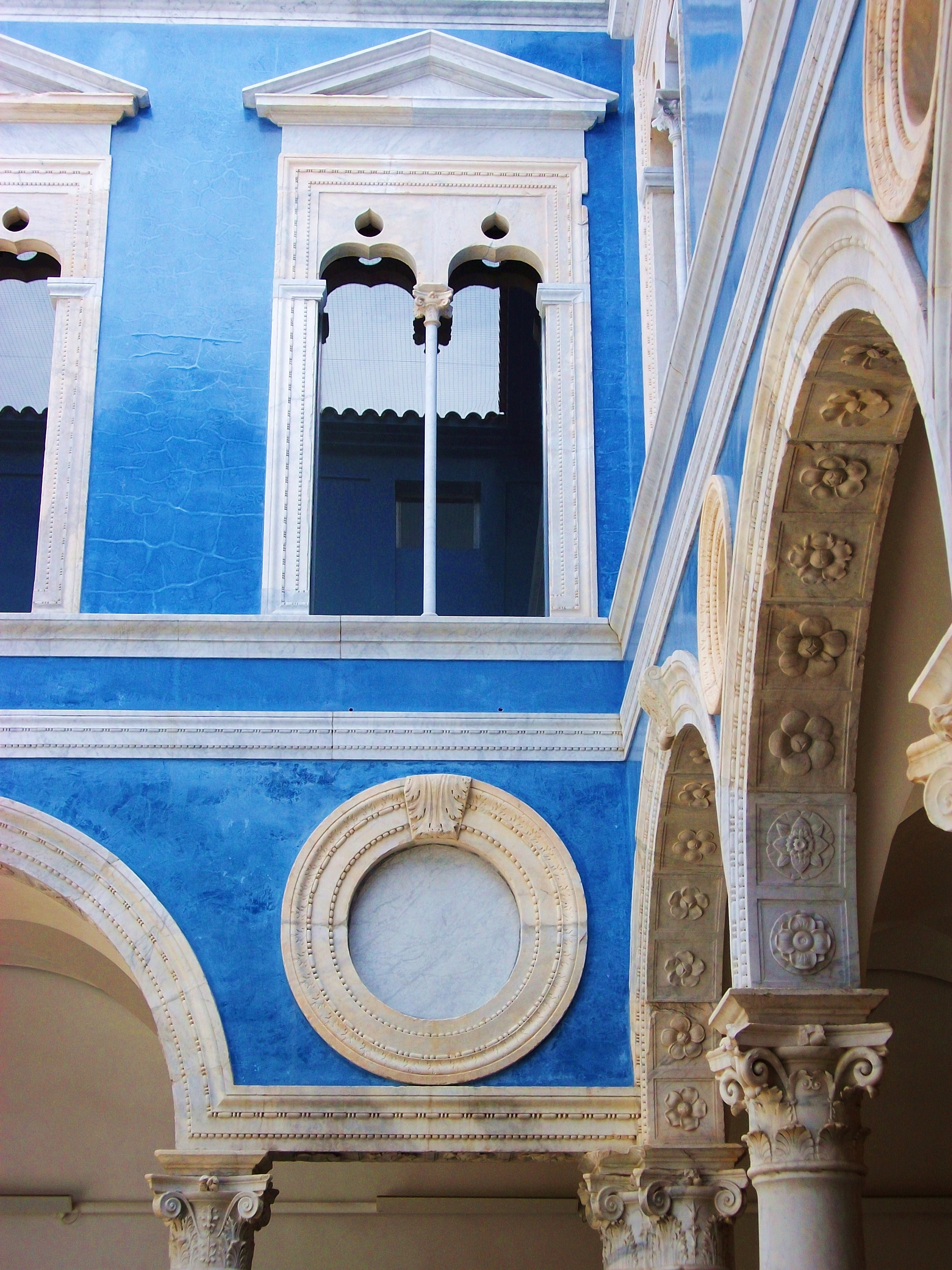 Cortile del palau de l'ambaixador Vich, valència, Museu de Belles Arts.